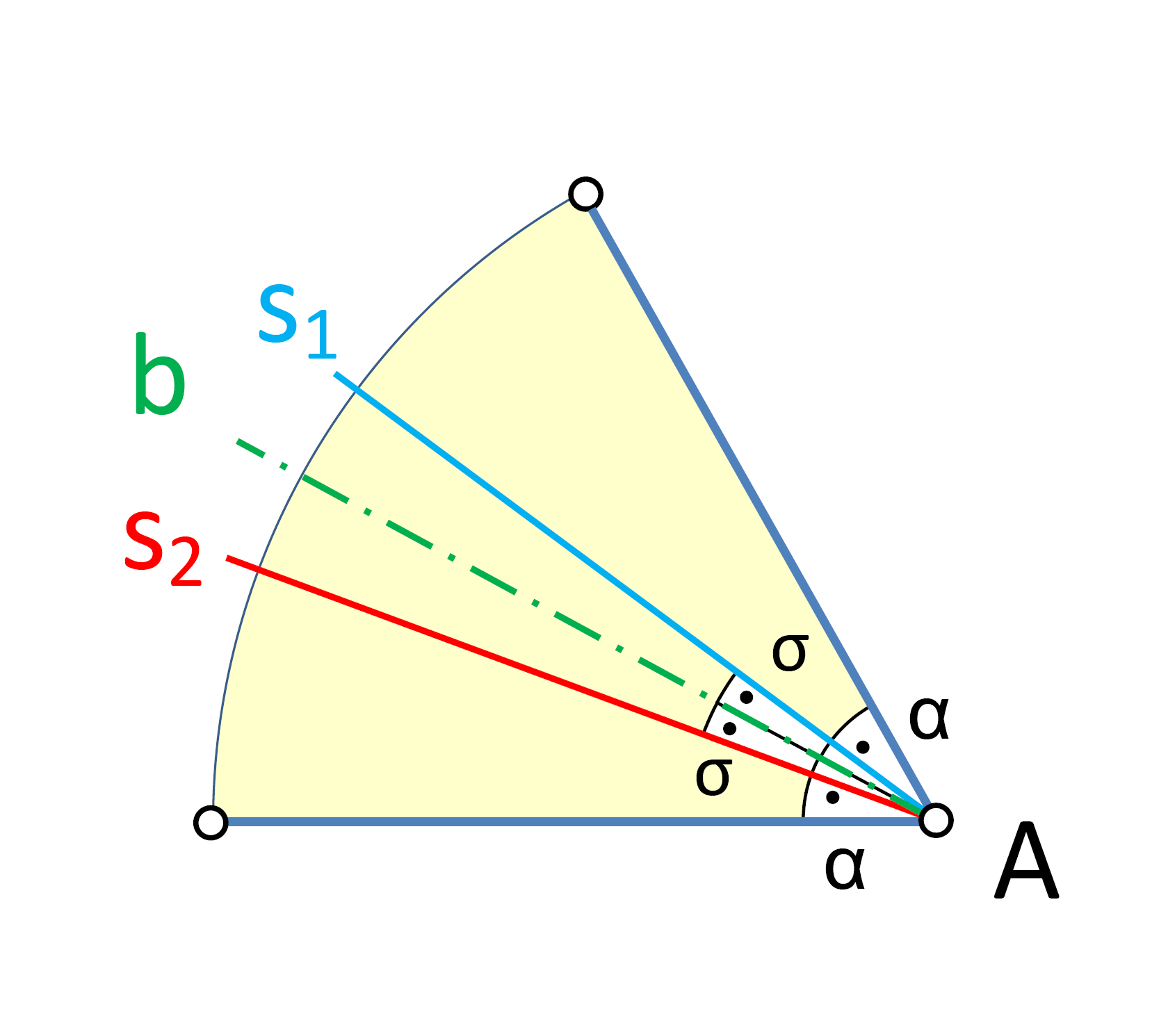 Dos rectas isogonales (s1 y s2) respecto al ángulo A